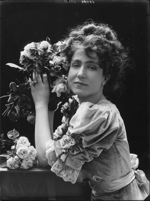 Corinna Teresa Ubertis (aka Teresah) fotografata da Mario Nunes Vais